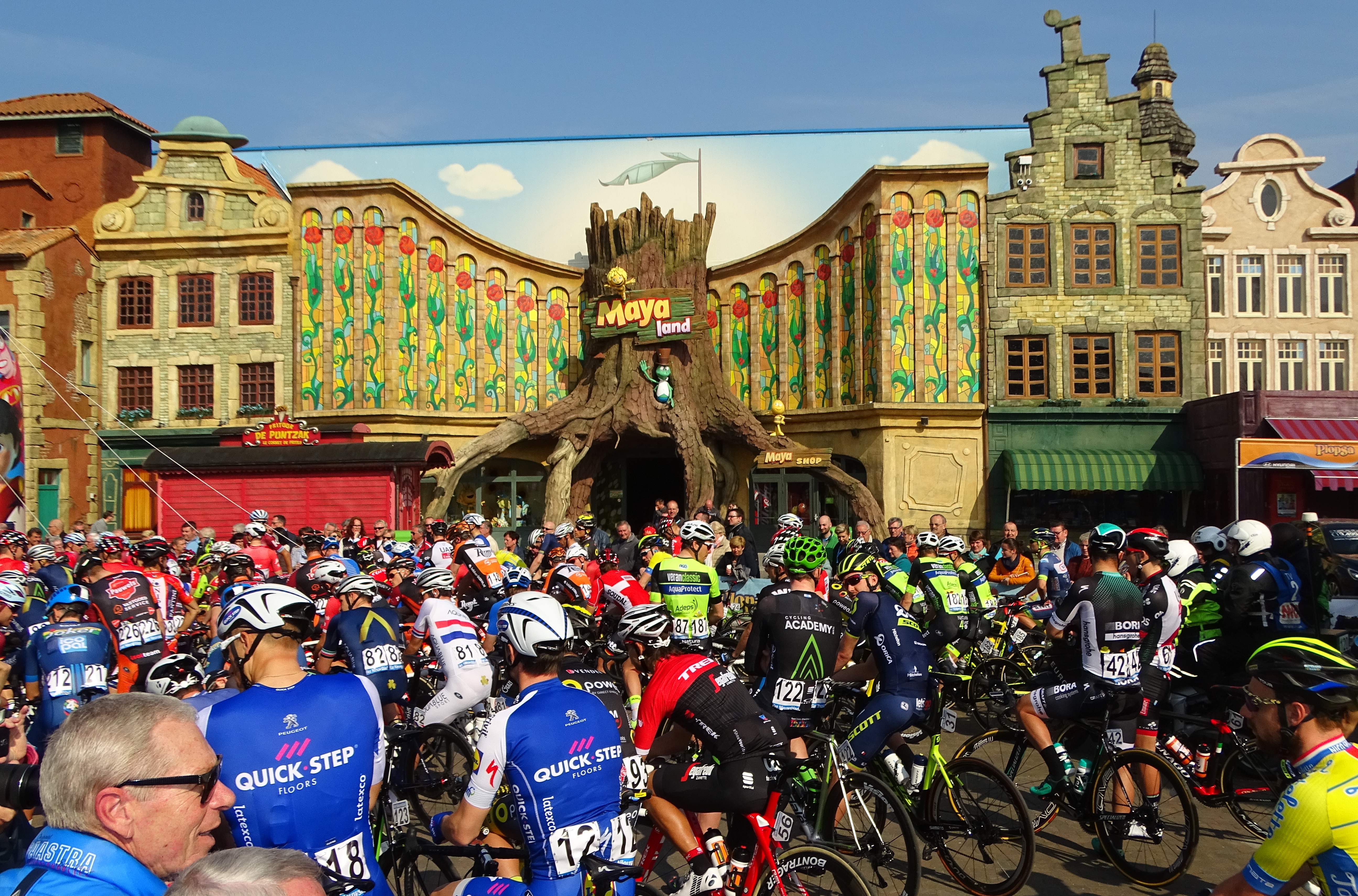 Reportage réalisé le mardi 28 mars à l'occasion de du départ de la première étape des Trois jours de La Panne 2017 à Adinkerque (La Panne), Belgique.